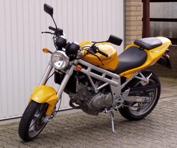 Toestemming van Tom Smeets (eigen foto)